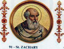 Pope Zachary